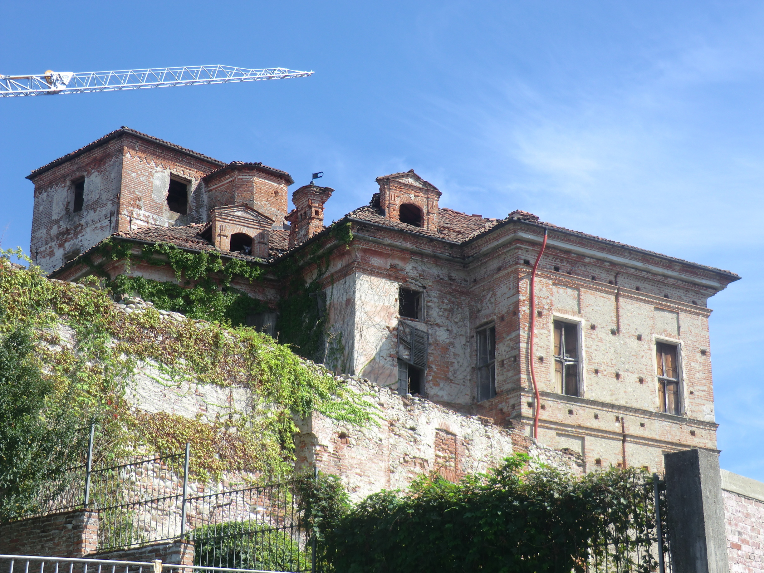 Beinette: castello (sec. XI - XVIII)